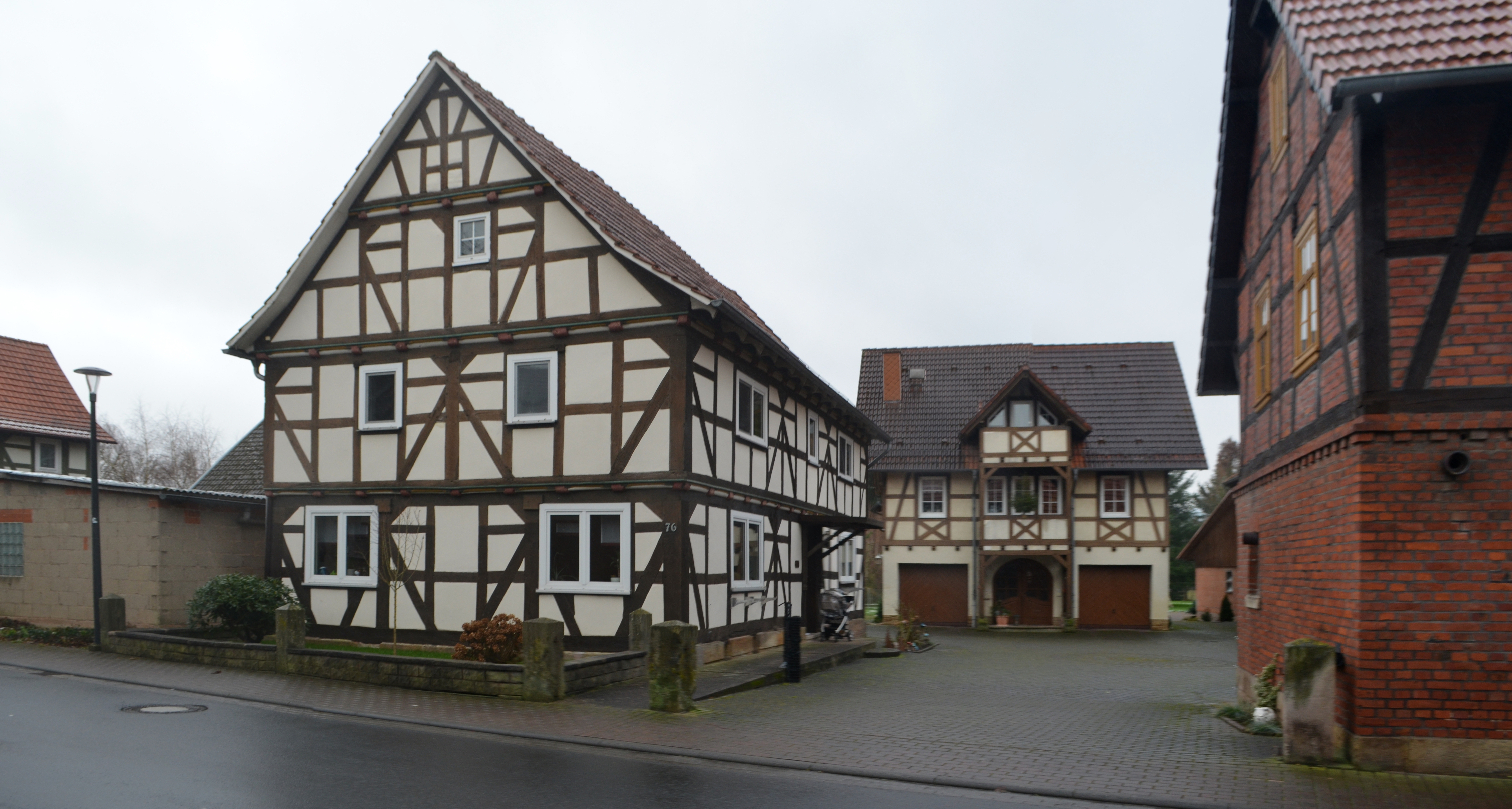 Oberlengsfeld, Landecker Straße 76